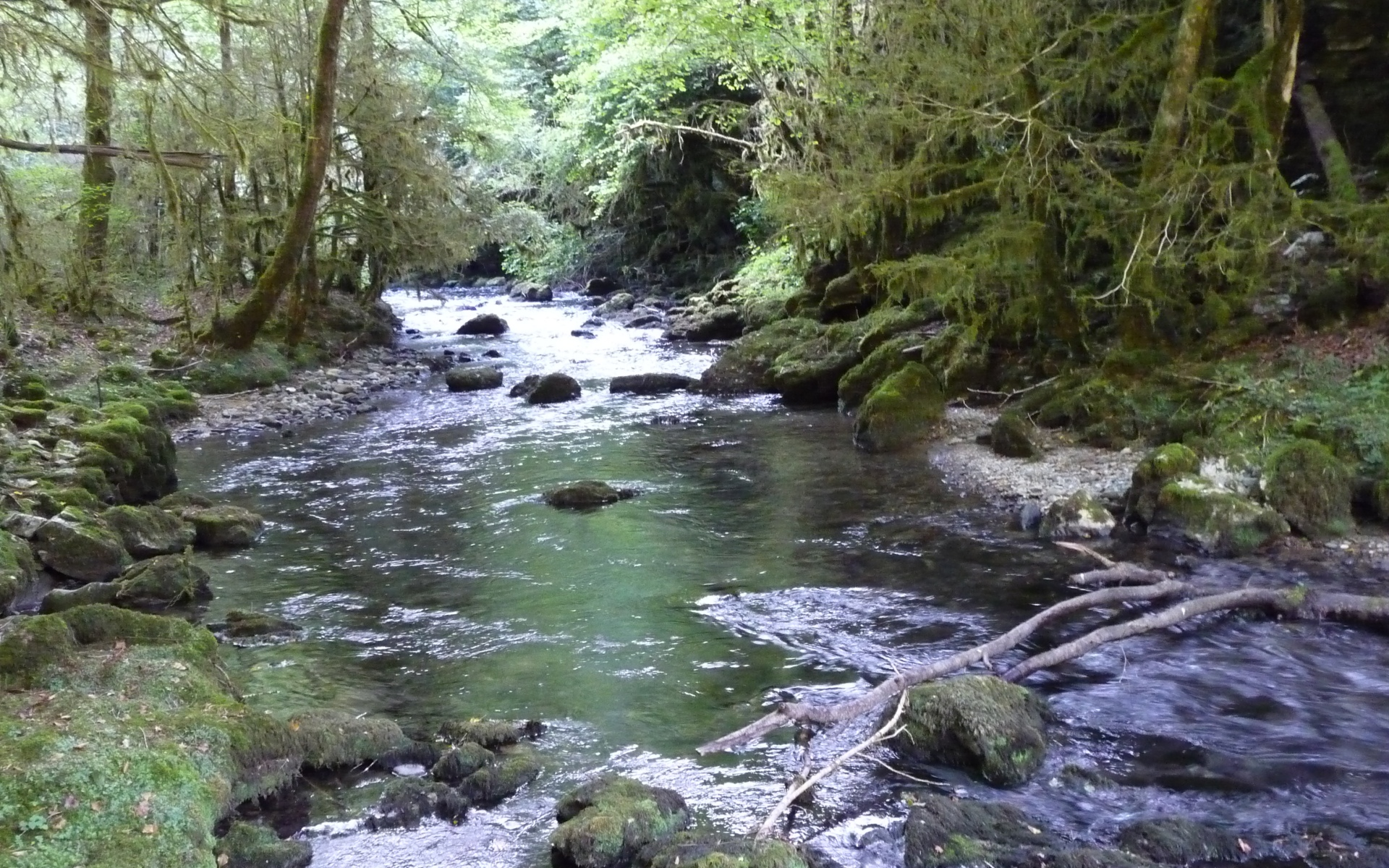 La petite amazonie, en contrebas de Lomné, à quelques mètres en amont de la convergence de l'Arros et de l'Ayguette